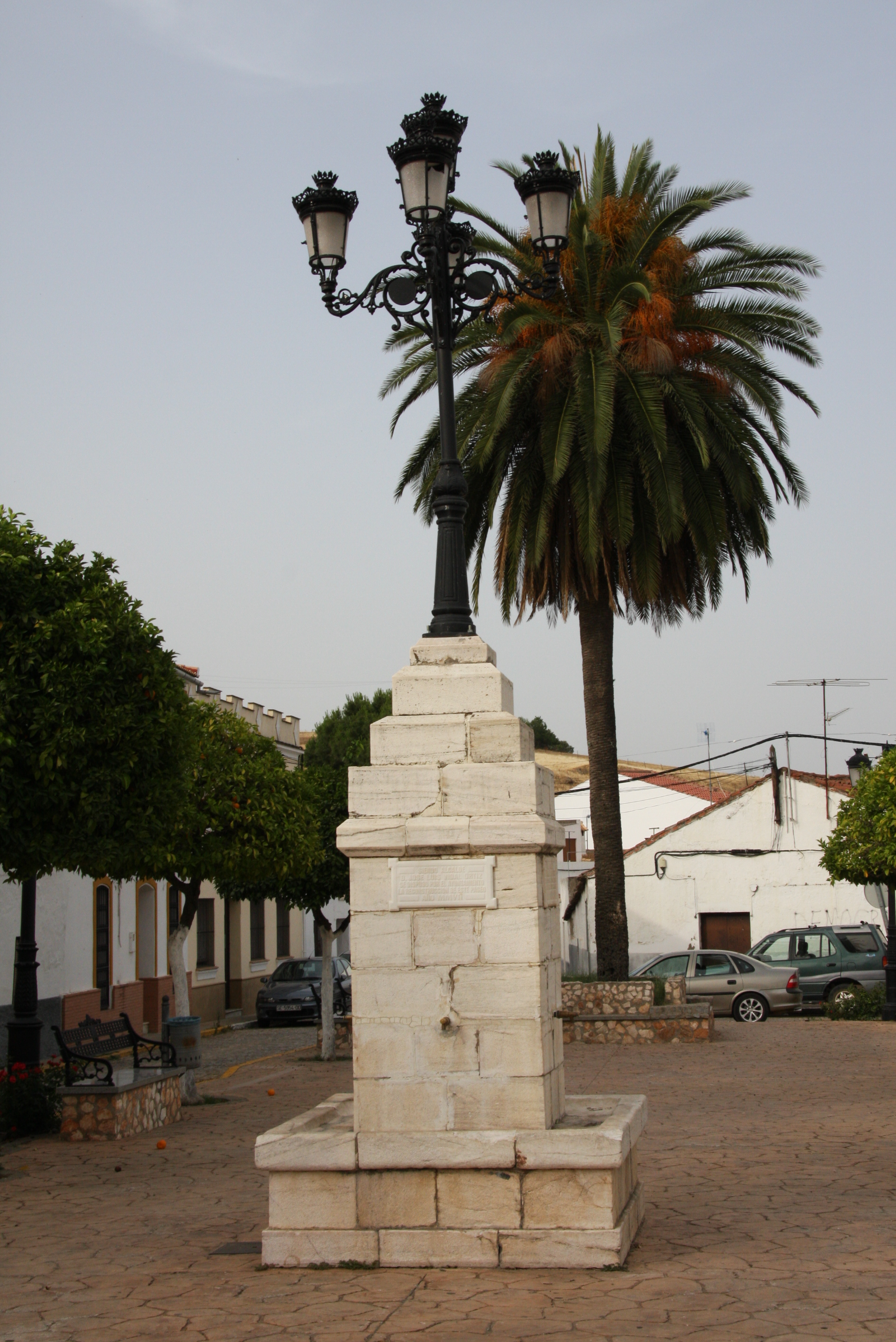 Fuente de la Palmera en Almadén de la Plata